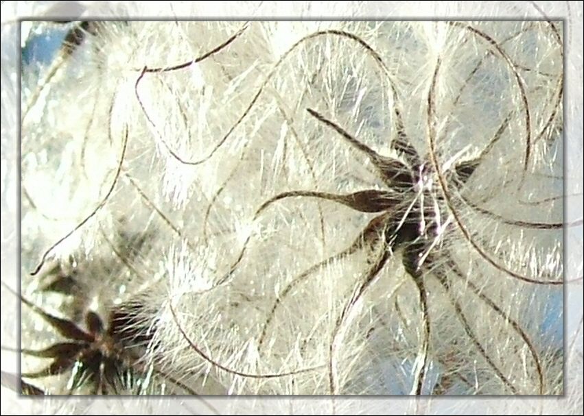 Fruchtstand der Gemeinen Waldrebe (Clematis vitalba) im Winter